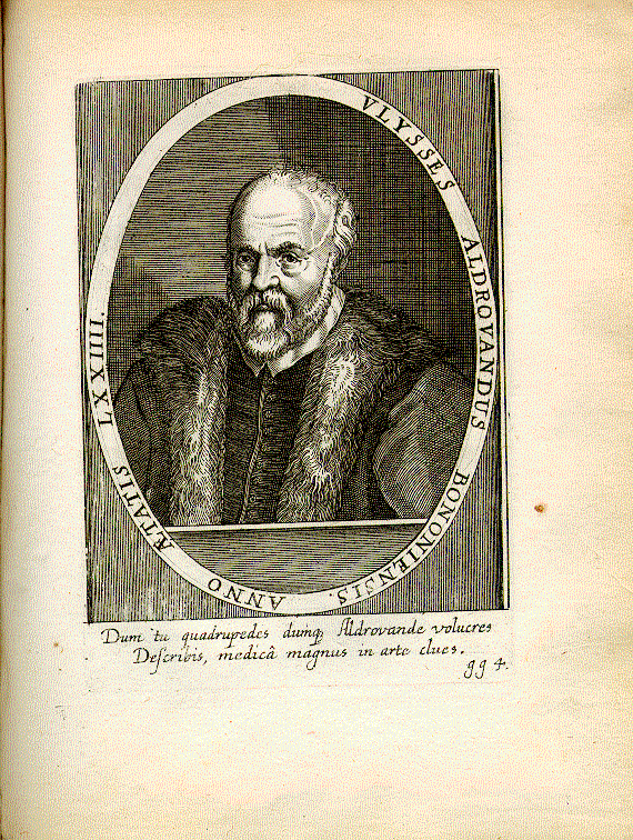 Ulisse Aldrovandi da Aport (1522 – 1605)